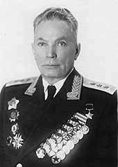 Михаил Николаевич Шарохин (1898 — 1974) — советский военачальник